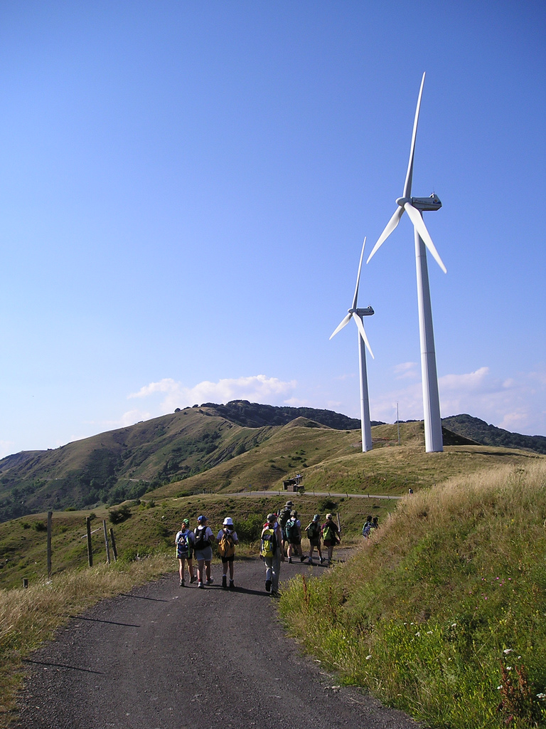 pale eoliche, Varese Ligure